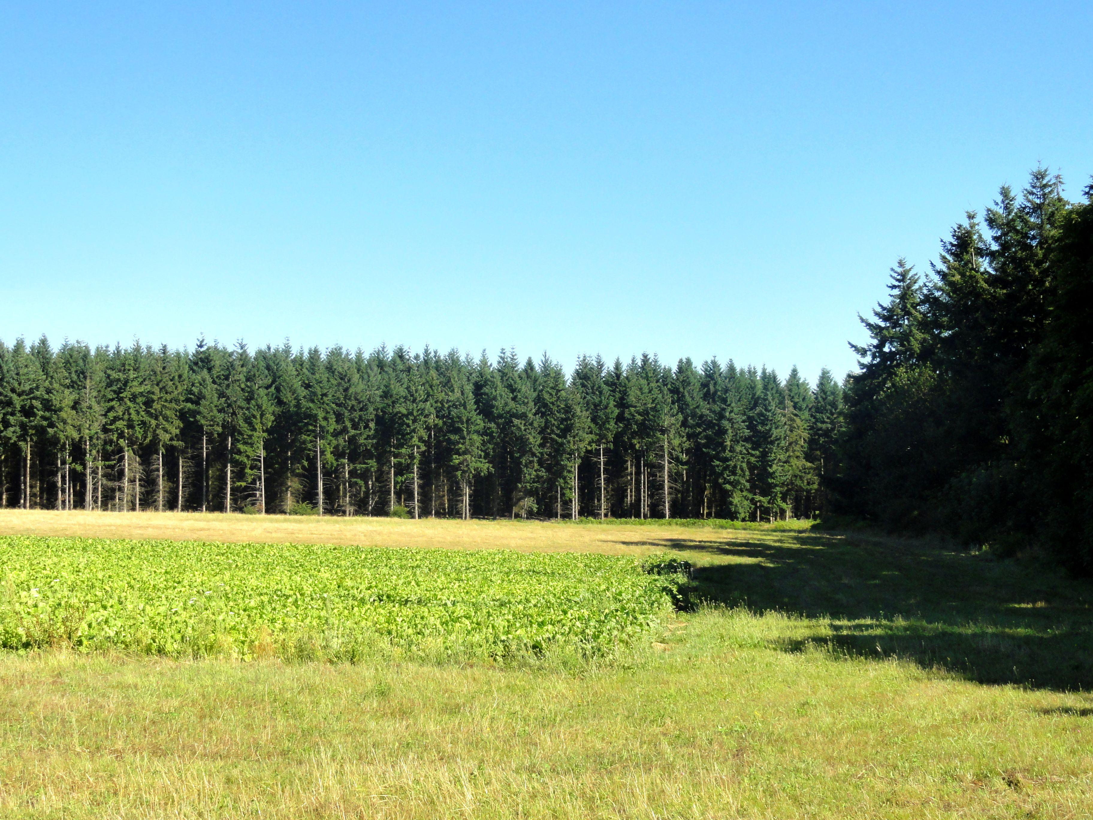 Lisière de forêt, au nord-est du village de Gondreville (Oise).